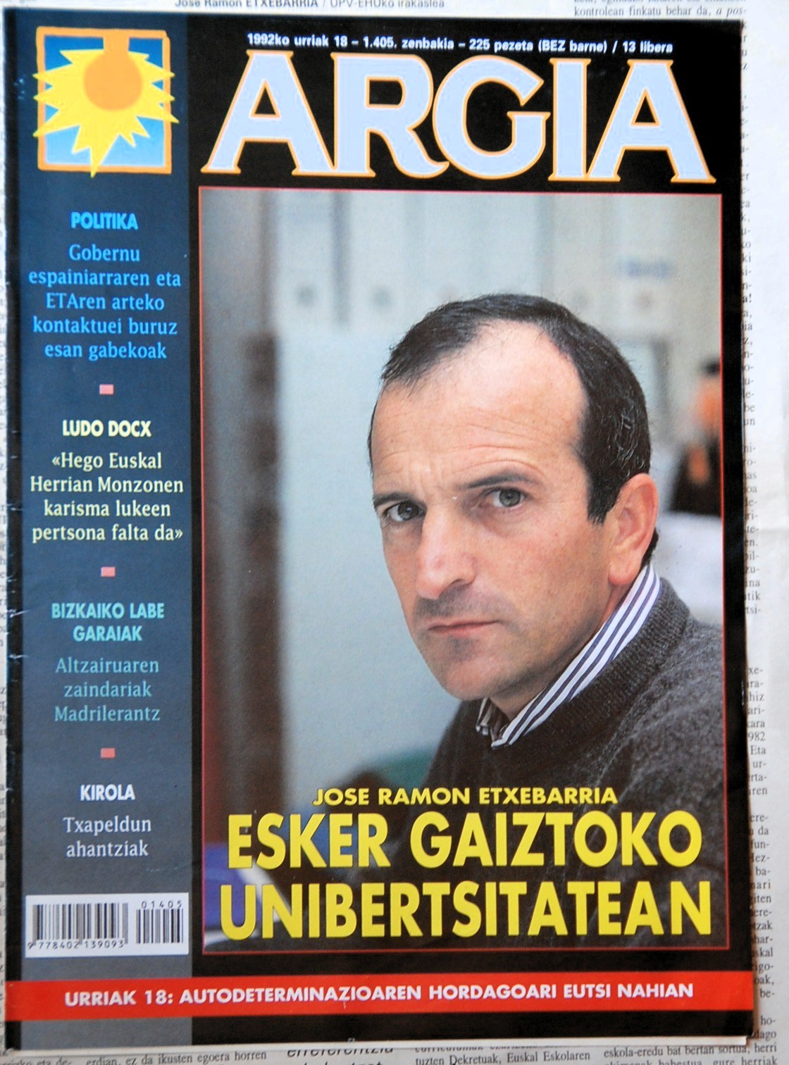 Argia aldizkariaren azala (1992-10-18)